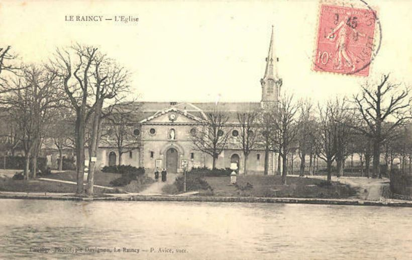 Le Raincy.L'église